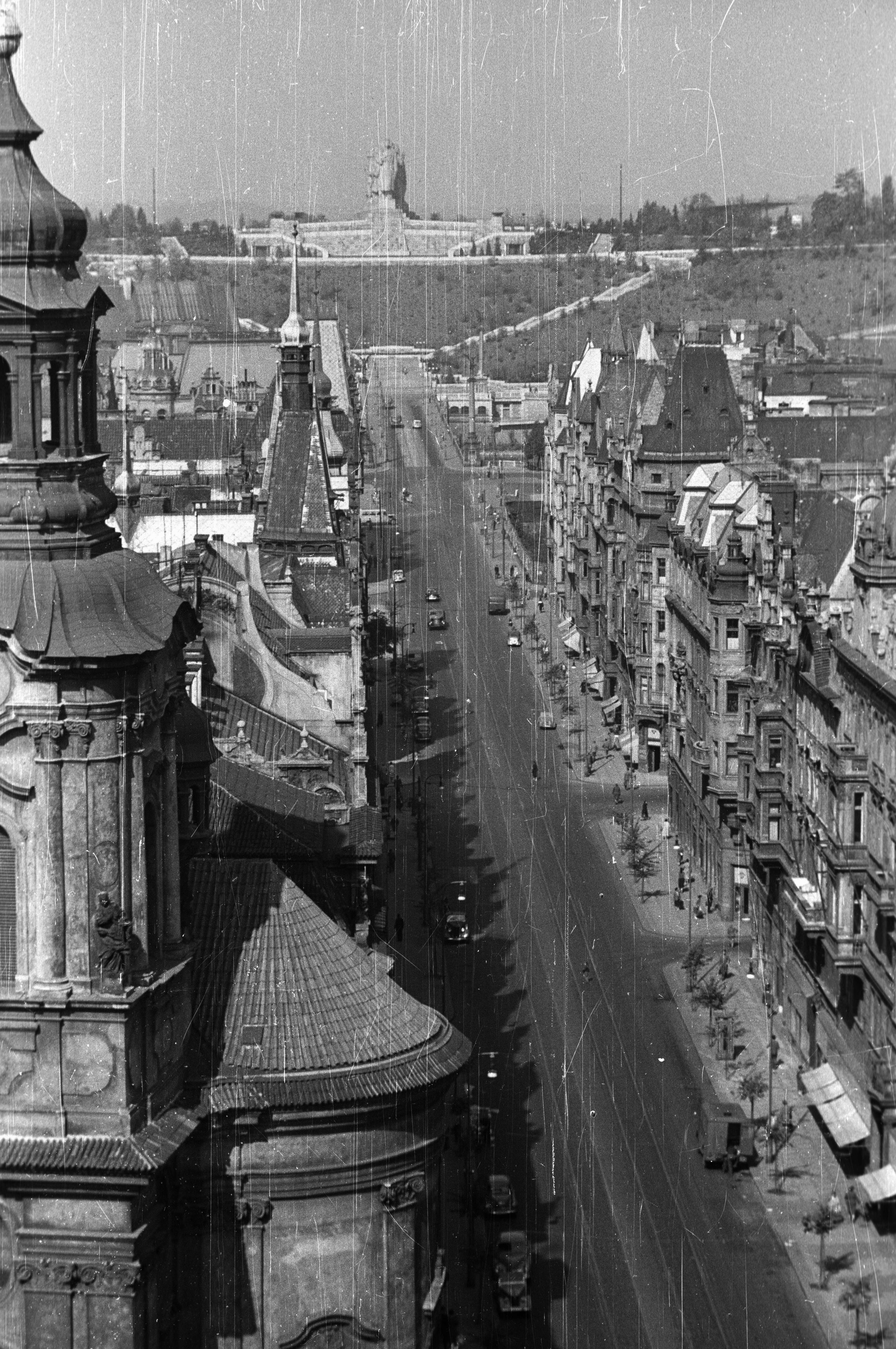 Parizská ulice az Óratoronyból a Sztálin emlékmű felé nézve. Location: Czech Republik, Prague Tags: picture, Czechoslovakia, Joseph Stalin portrayal Title: Parizská ulice az Óratoronyból a Sztálin emlékmű felé nézve.